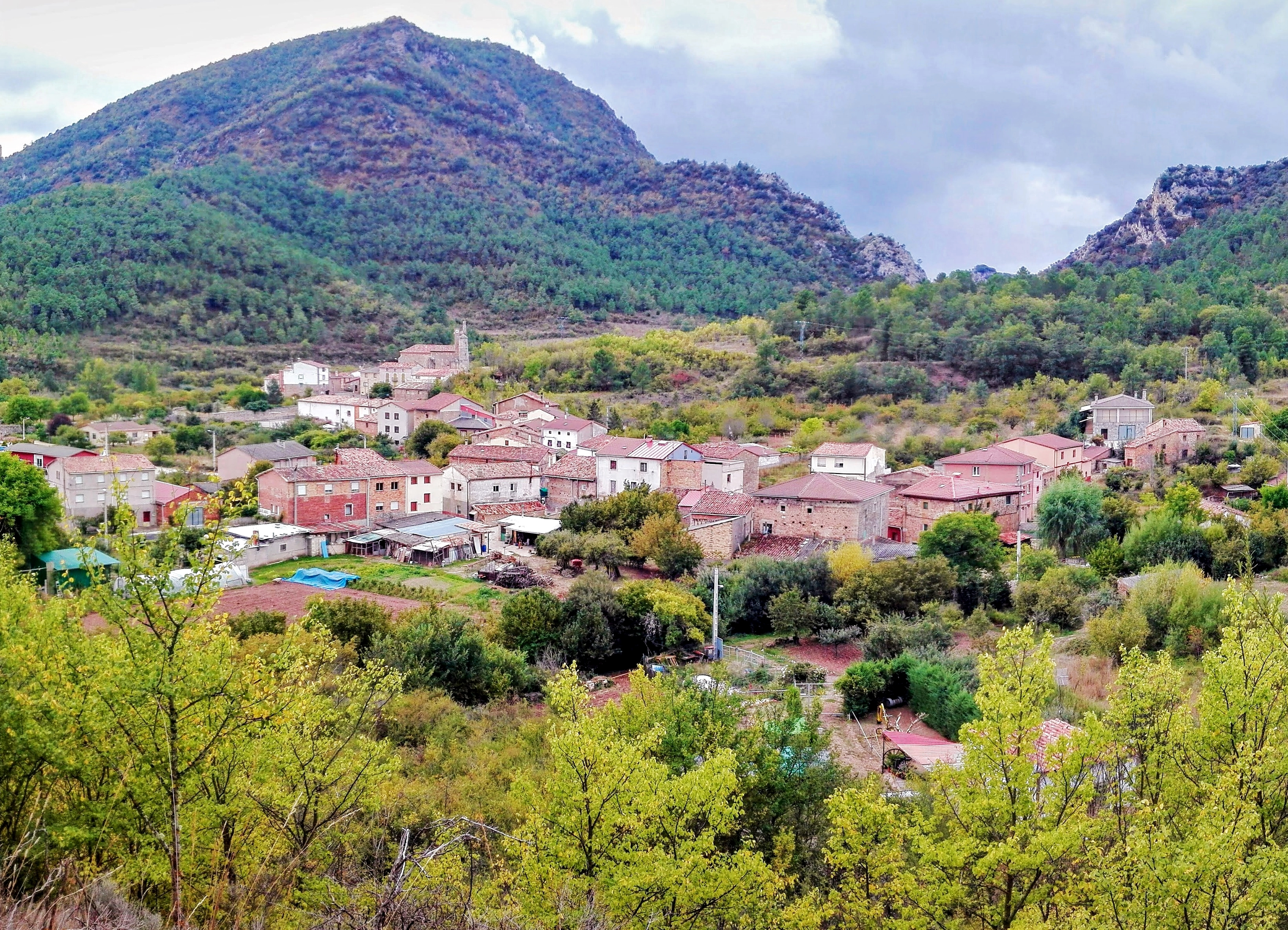 Panorámica de la localidad de Quintanaopio (Burgos)